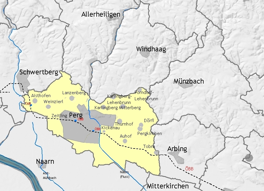 Lage der Ortschaften in der Stadtgemeinde Perg unter Nutzung der von DORIS als freier Download bereit gestellten Straßenkarte OE200, Colorierung vorgenommen und ungefähre Lage sowie Bezeichnung der Ortschaften eingefügt.